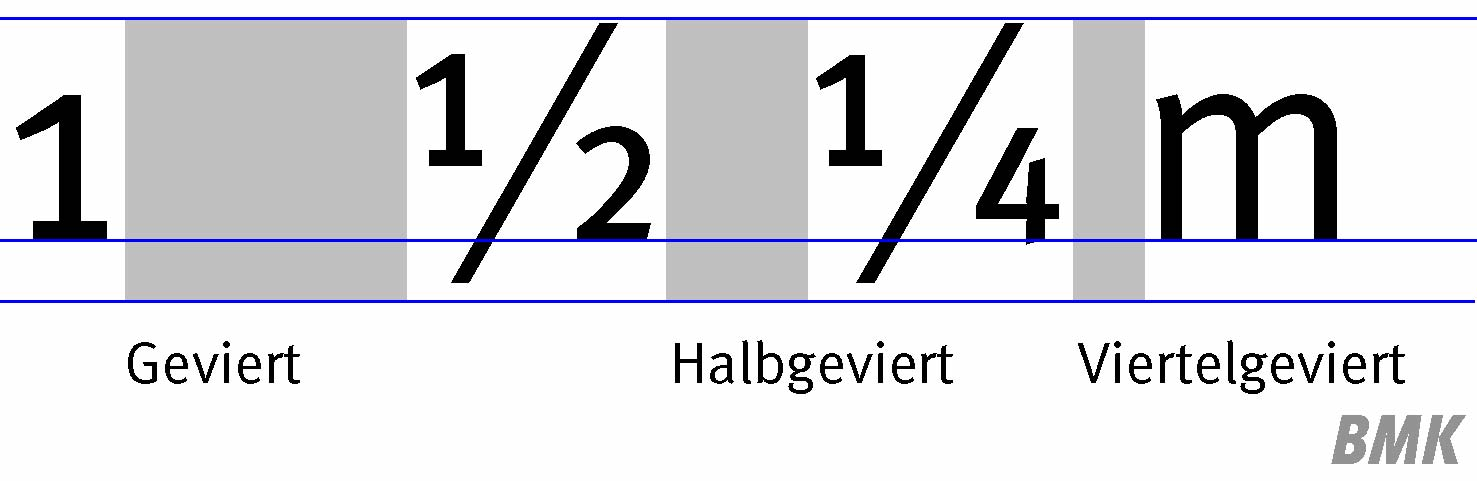 Geviert, Halbgeviert und Viertelgeviert Please send reference and voucher copy to BMK(at)clever.ms Bitte Quellenangabe und Beleg an BMK(at)clever.ms